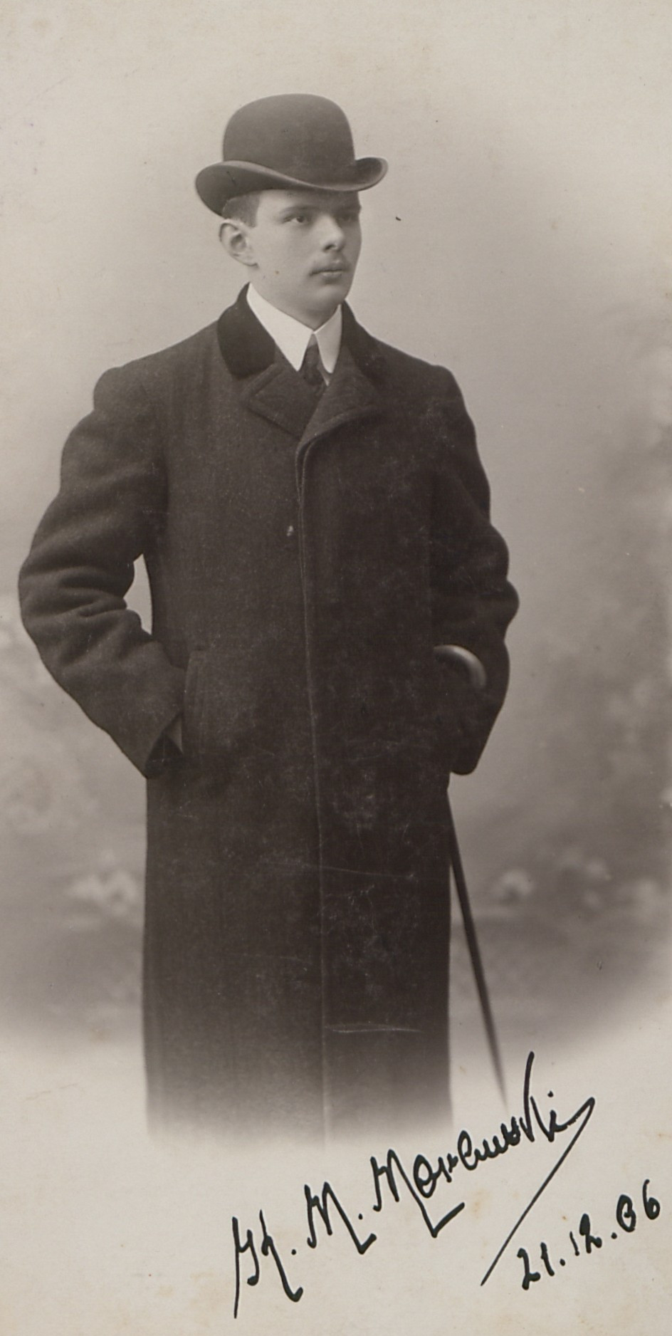 Kazimierz Marian Morawski